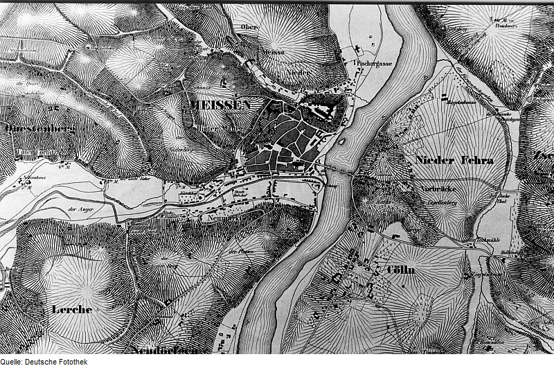 Original image description from the Deutsche Fotothek Meißen. Reichmühle, Ausschnitt aus: Isiskarte, 1864 (Stadtarchiv Meißen)